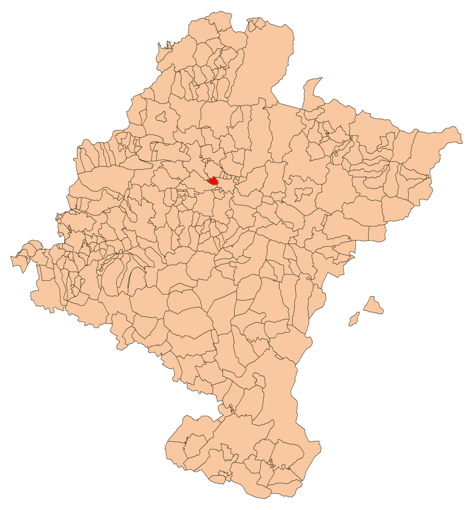 Orkoien Nafarroako mapan kokatua.